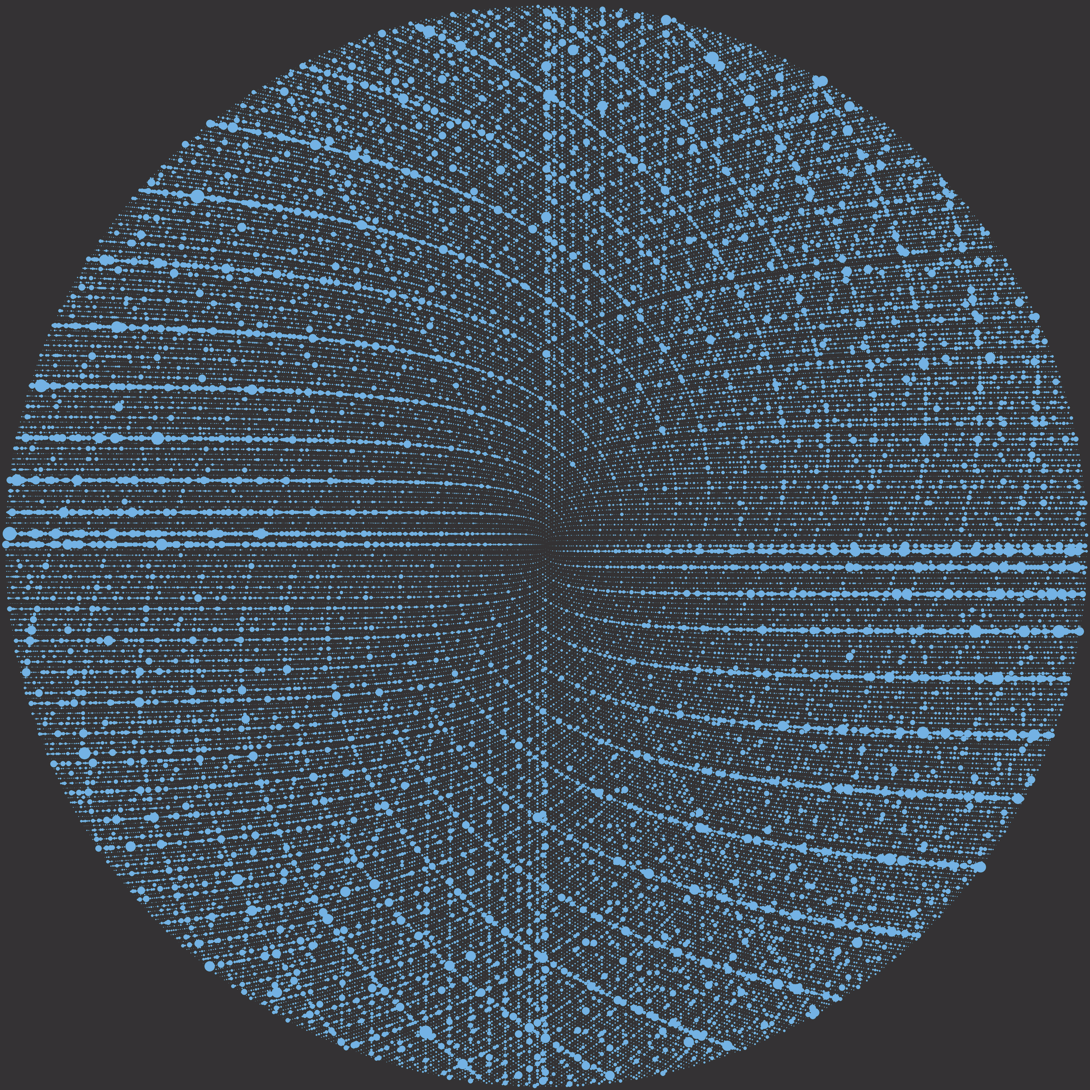 Spirale de Sacks du nombre de diviseurs des 100 000 premiers entiers naturels.